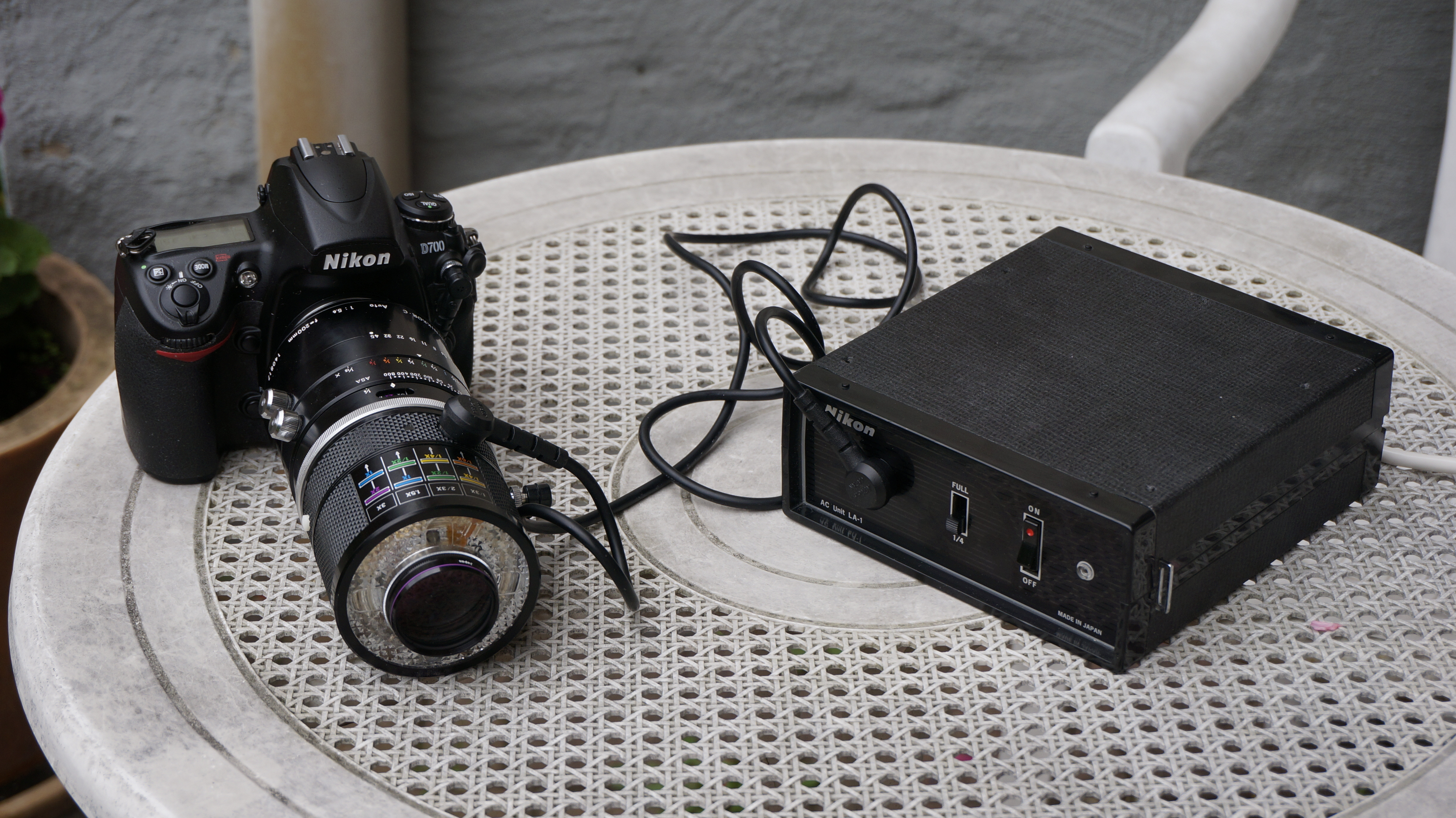 _DSC1230